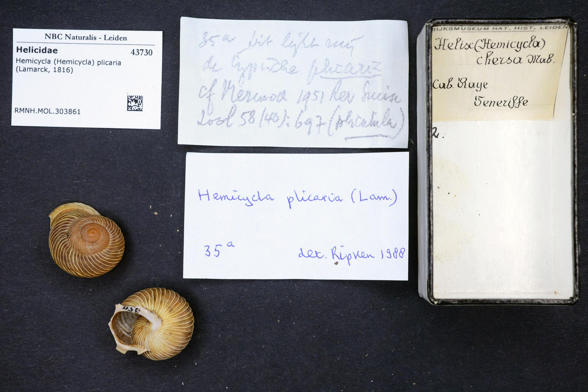 Hemicycla (Hemicycla) plicaria (Lamarck, 1816)